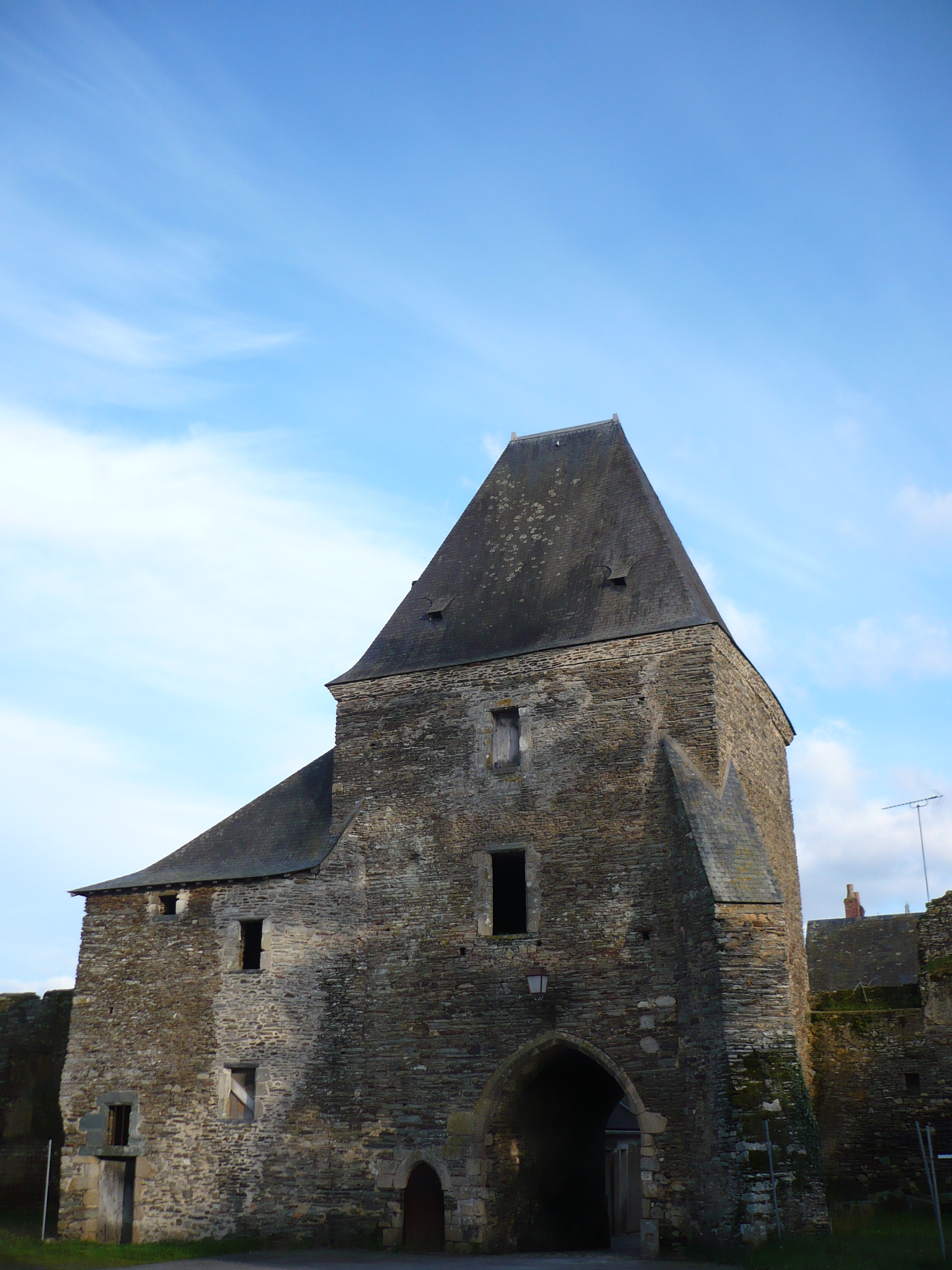 Tour Porche, Pouancé